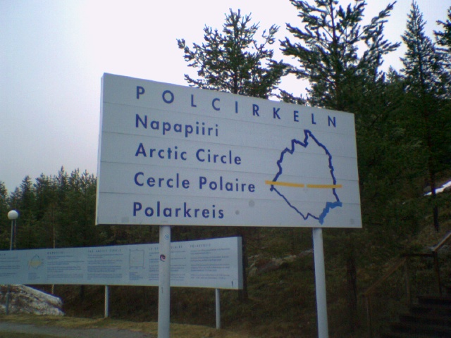 Polarkreis bei Jokkmokk, Schweden